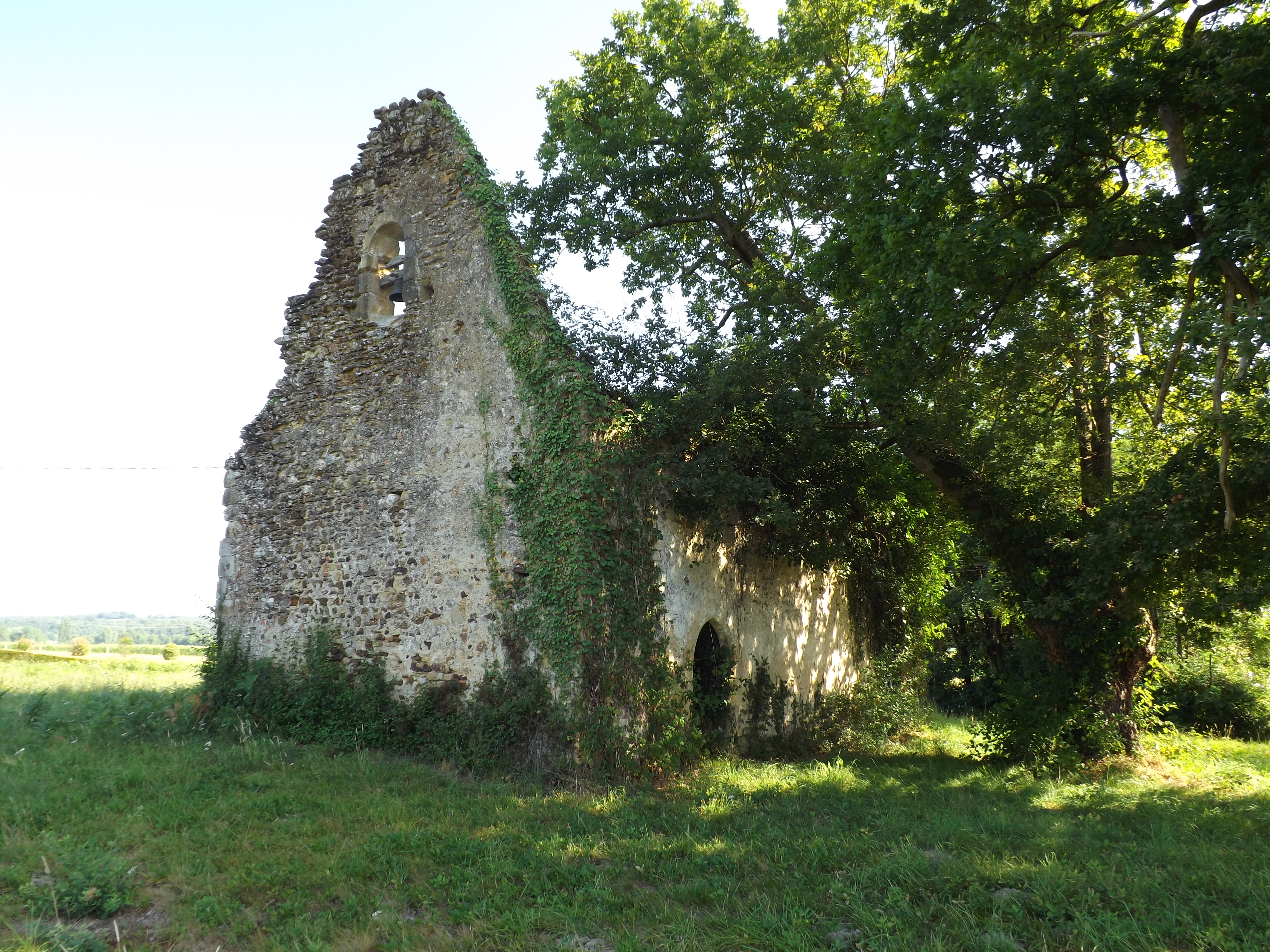 Capèra de sent Joan, Pèira, Lanas, Gasconha